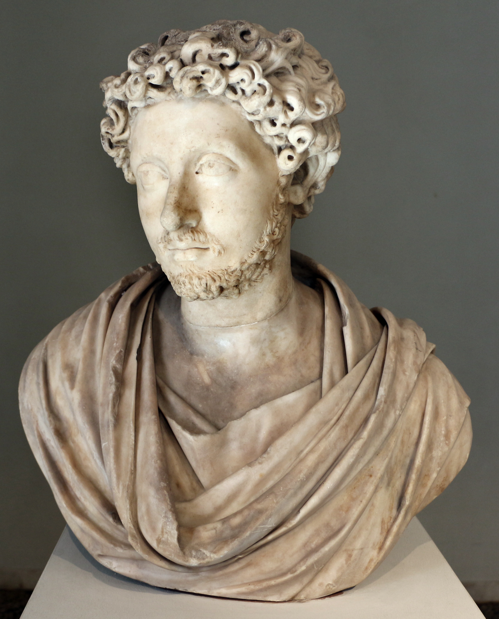 Museo Archeologico Nazionale This is a photo of a monument which is part of cultural heritage of Italy.